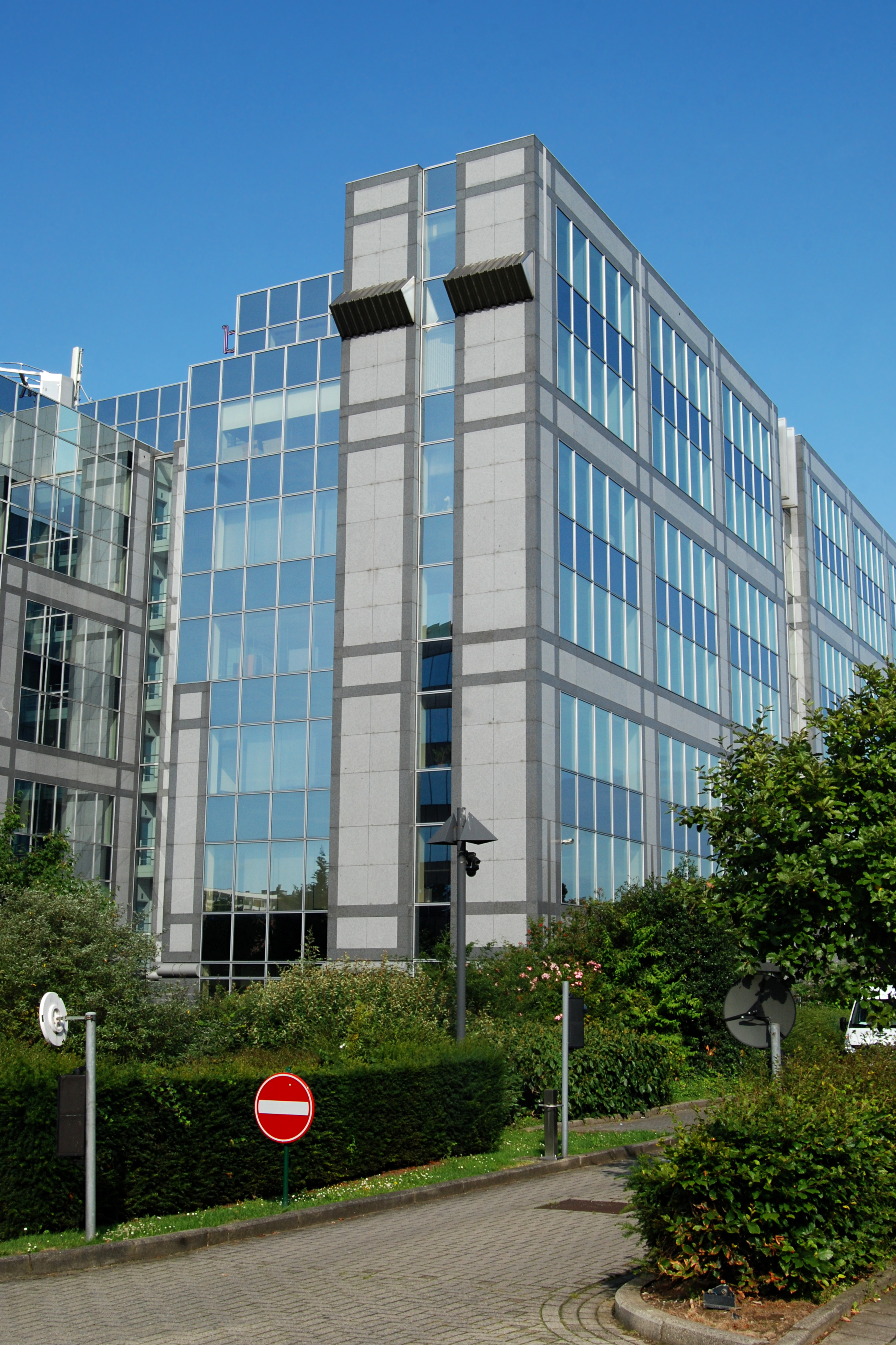 Belgique - Bruxelles - Boulevard de la Plaine 1 (architecture postmoderne - Bureau d'architecture Henri Montois - 1995) :ancien siège de Citibank en Belgique, puis siège de Beobank